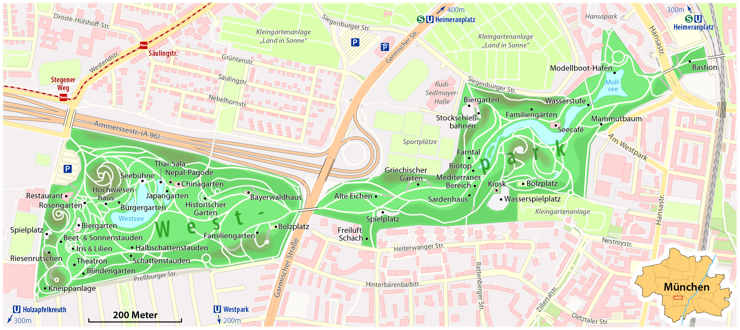 Der Westpark in München (Karte)